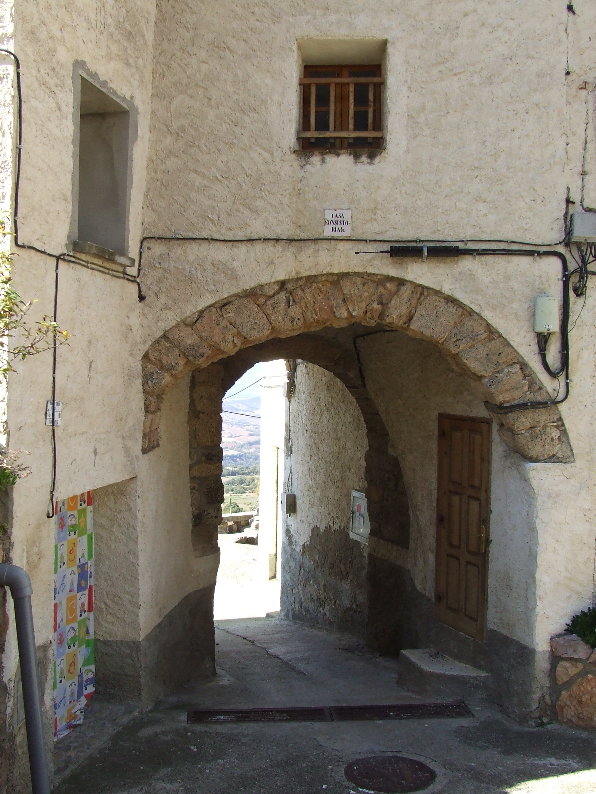 Portal d'accés a l'antiga vila closa de Benavent de la Conca (Isona i Conca Dellà, Pallars Jussà)